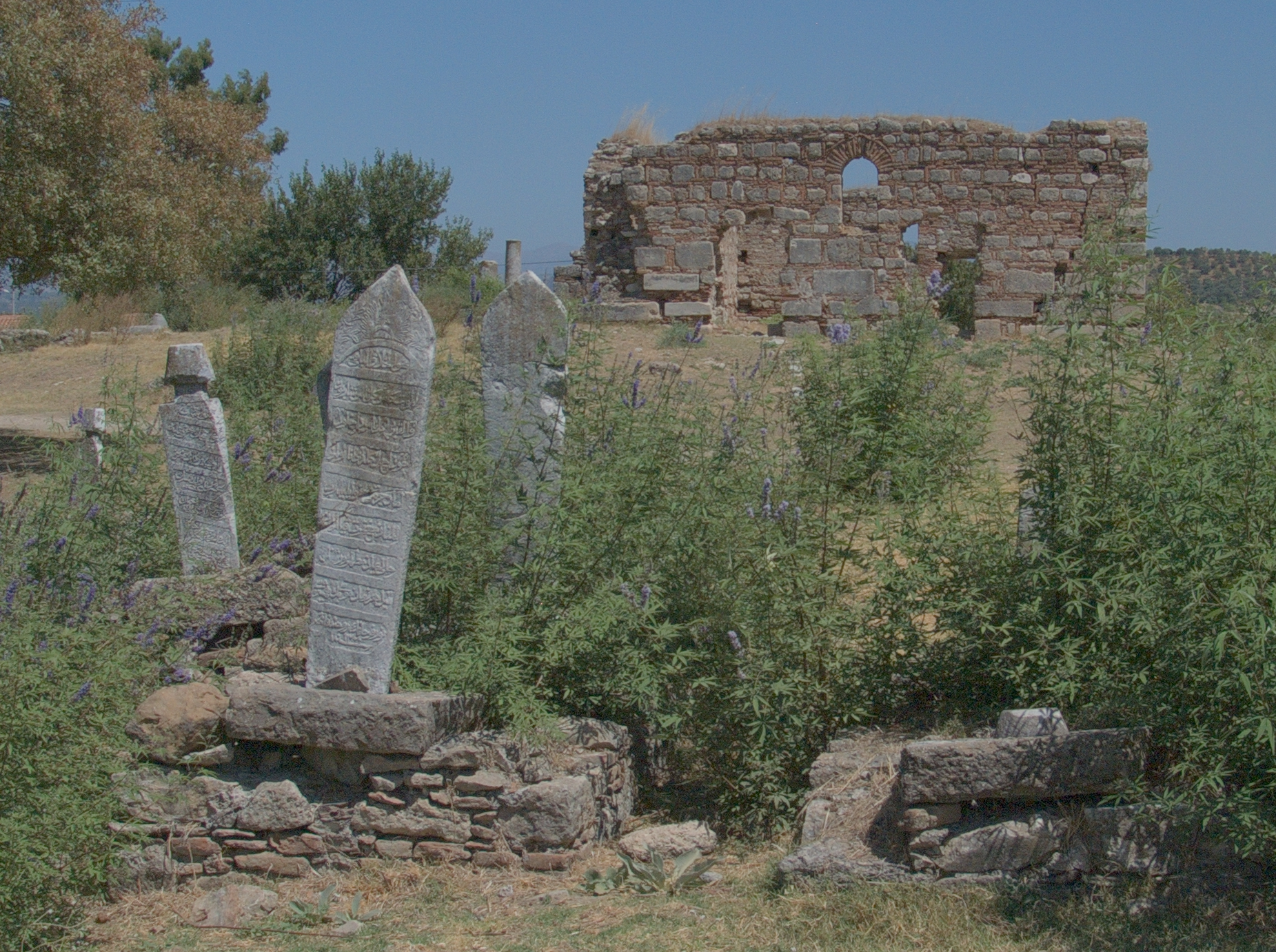 Магнесия на Меандре. Мечеть Cerkez Musa